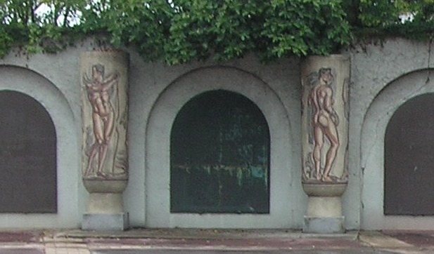 Bordeaux Stade Chaban-Delamas ancien Stade Lescure 1938 Vases du céramiste René Buthaud